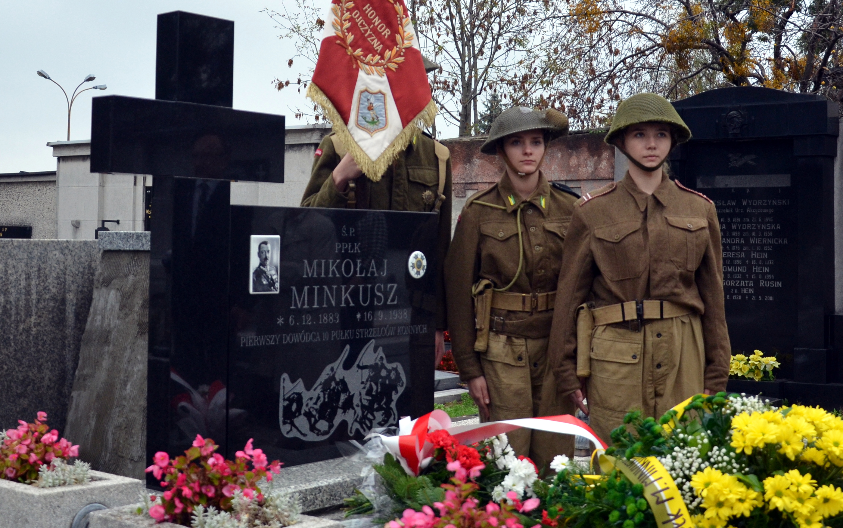 10 Pułk Strzelców Konnych (II RP)